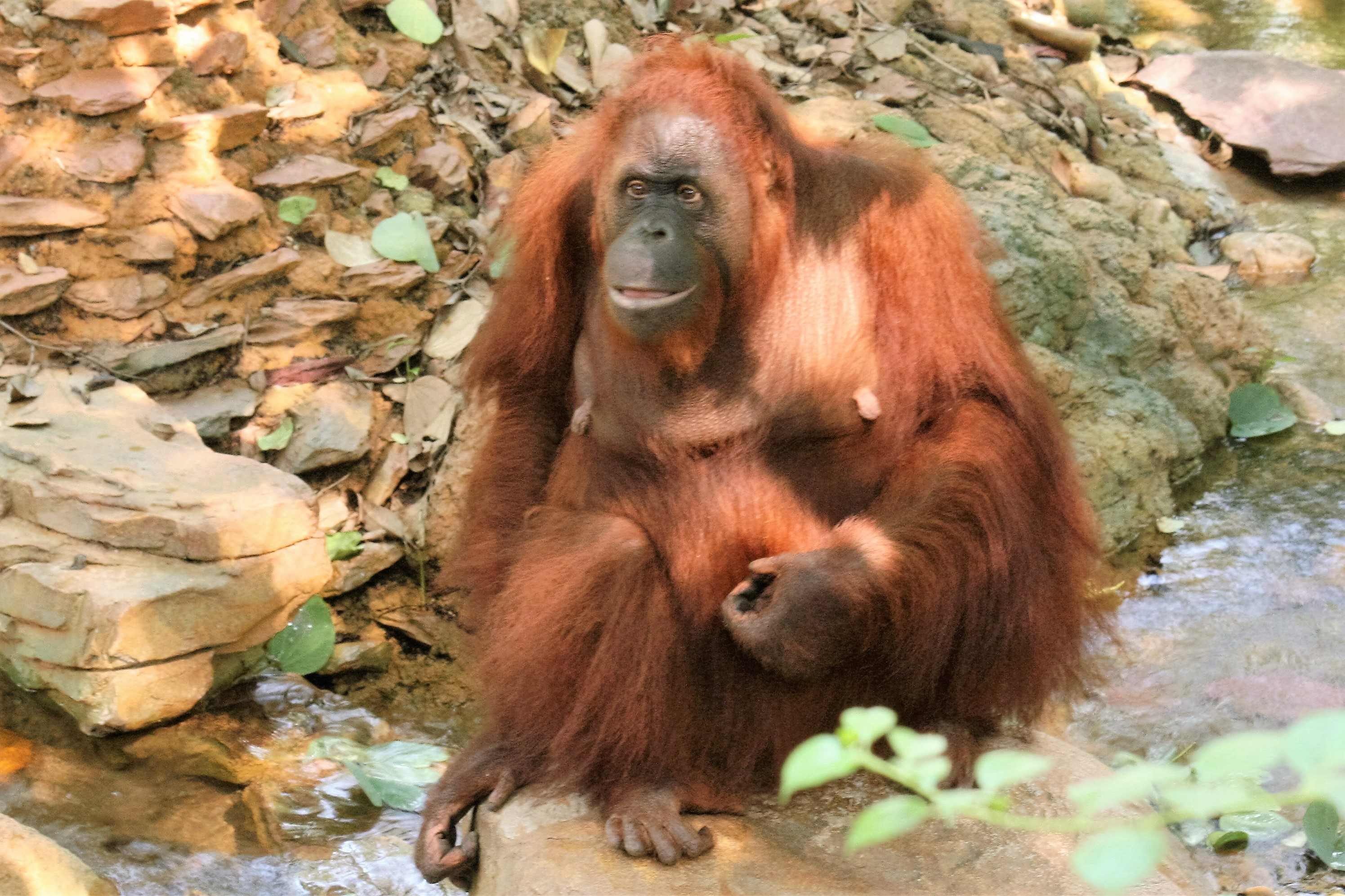 Zoo Guangzhou